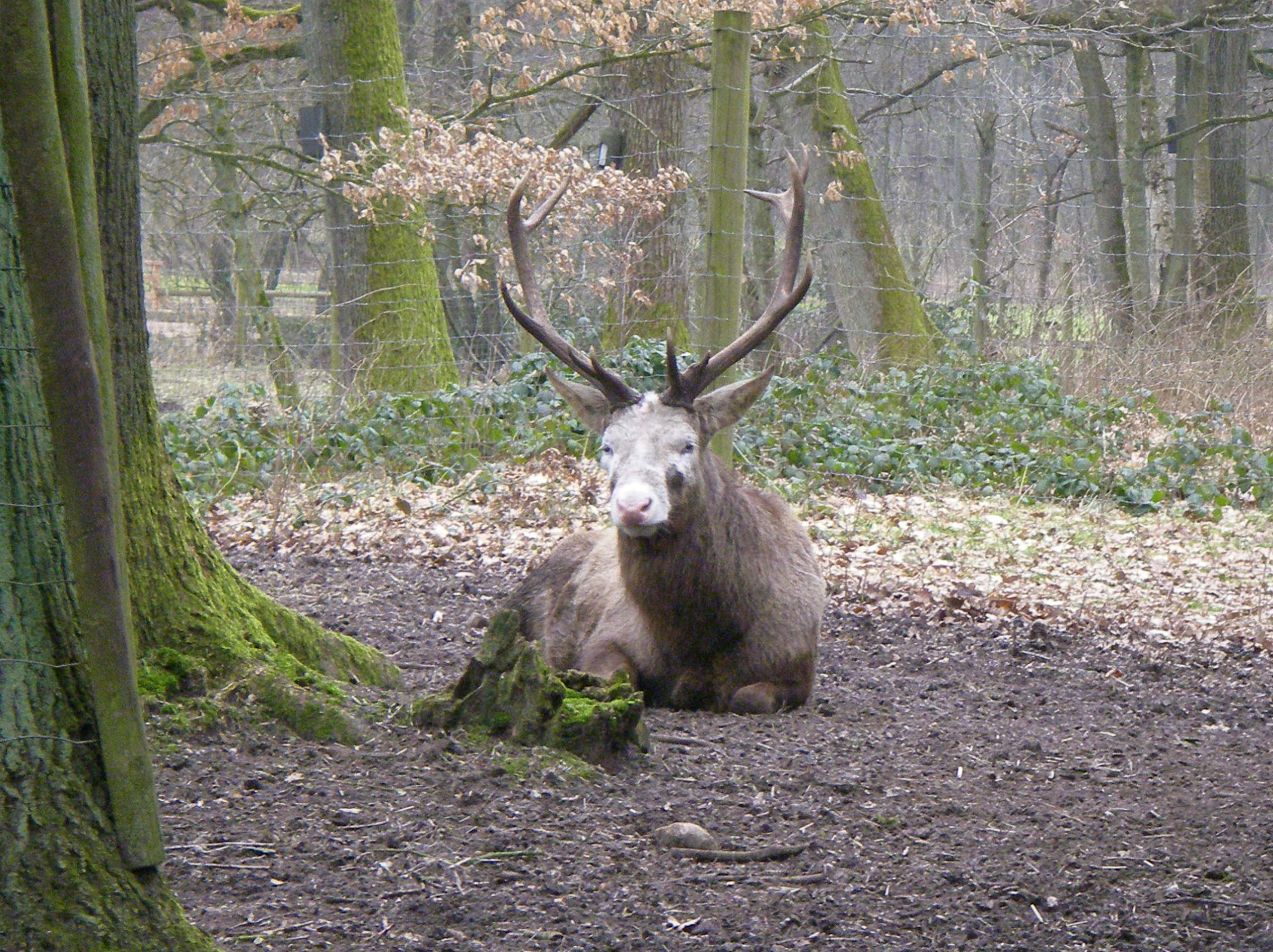 Blesshirsch im Wildpark Eekholt